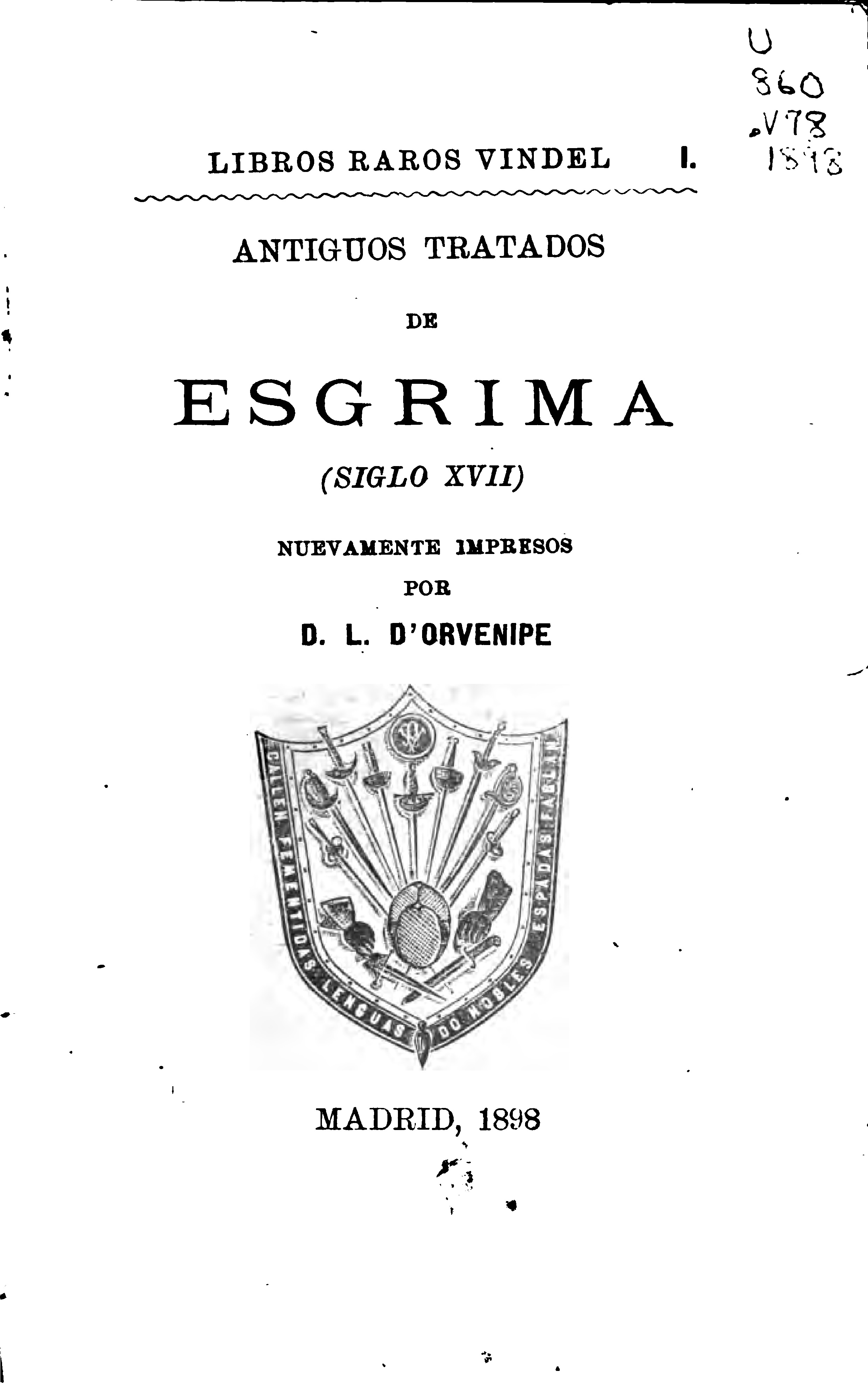 Pacheco de Narvaez, Luis Antiguos tratados de esgrima (siglo XVII); Cala, Cristobal de. Antiguos tratados de esgrima (siglo XVII)